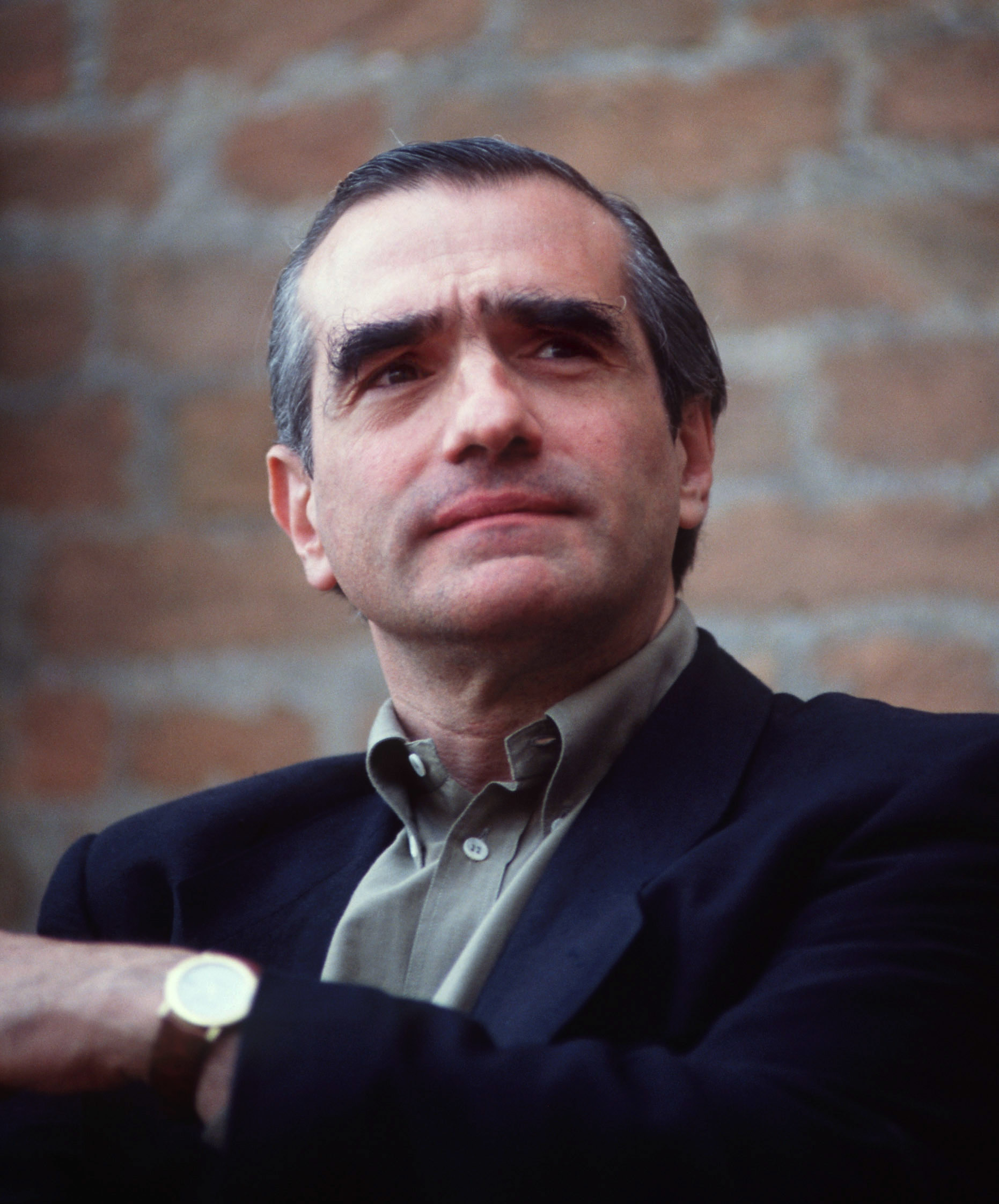 Il regista Martin Scorsese alla Mostra del Cinema di Venezia del 1995